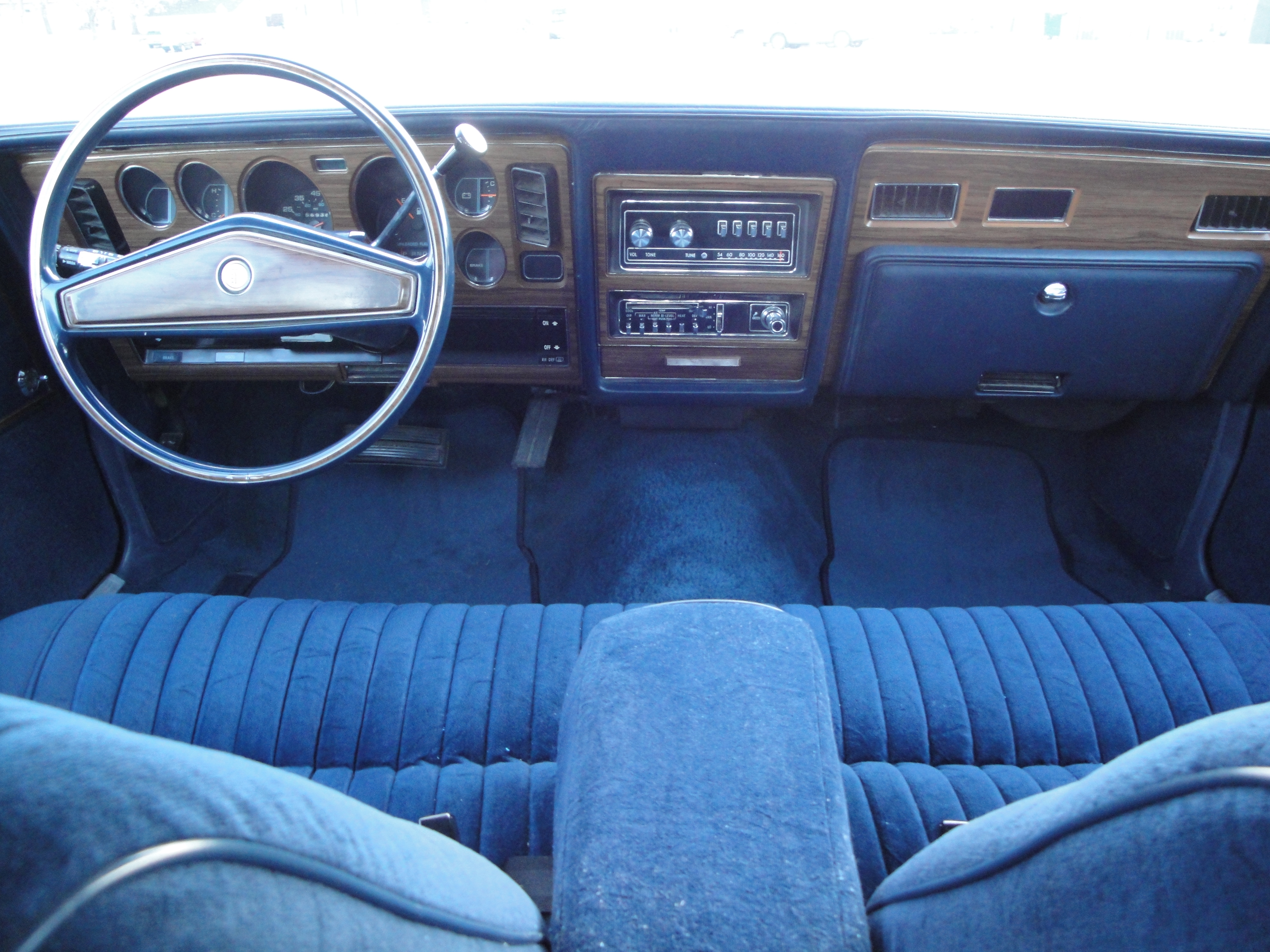 80 Dodge St.Regis Instrument Panel